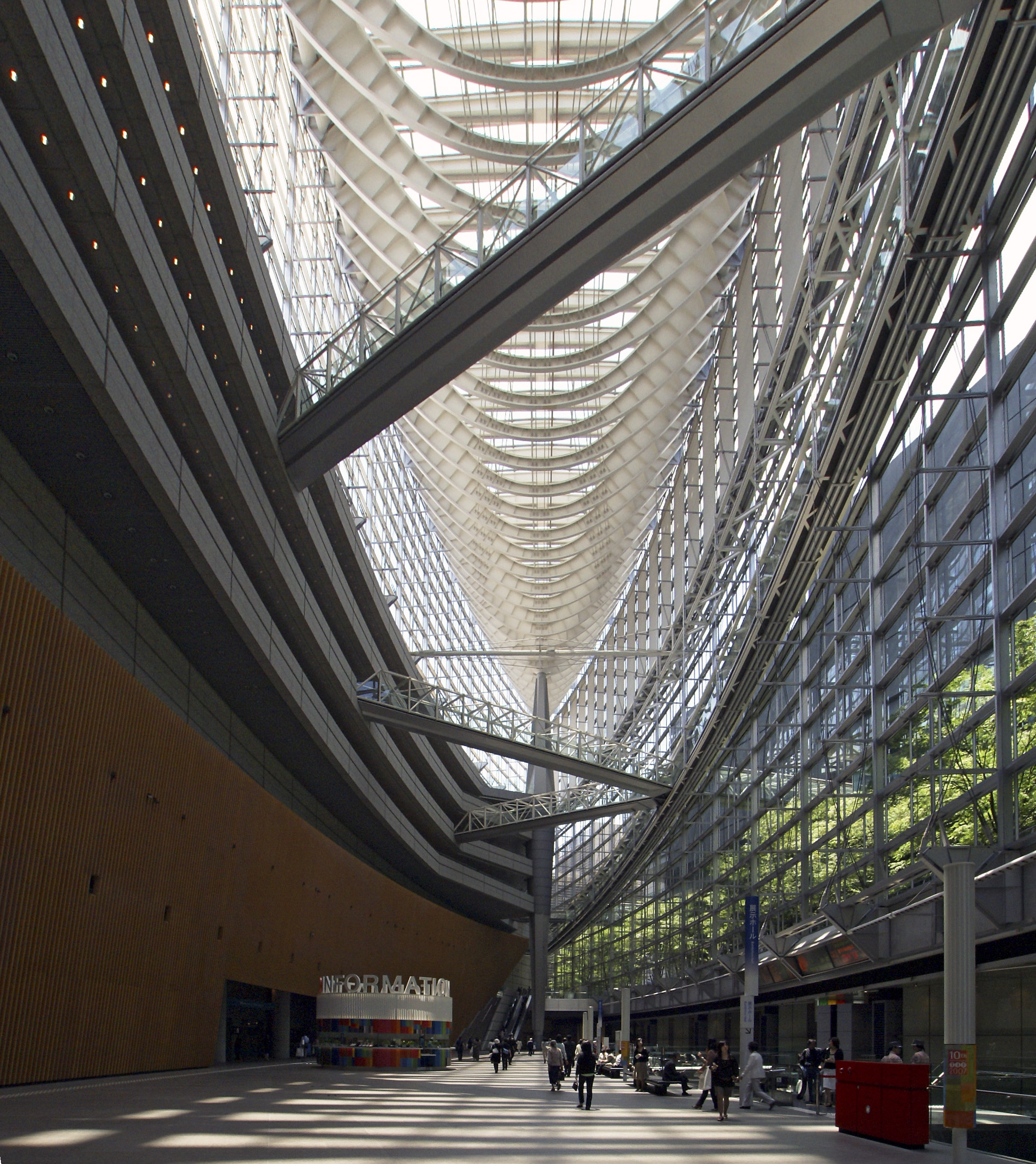 Tokyo International Forum in Chiyoda-ku, Tokyo, Japan